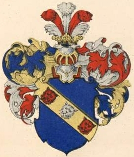 Loudoni suguvõsa aadlivapp